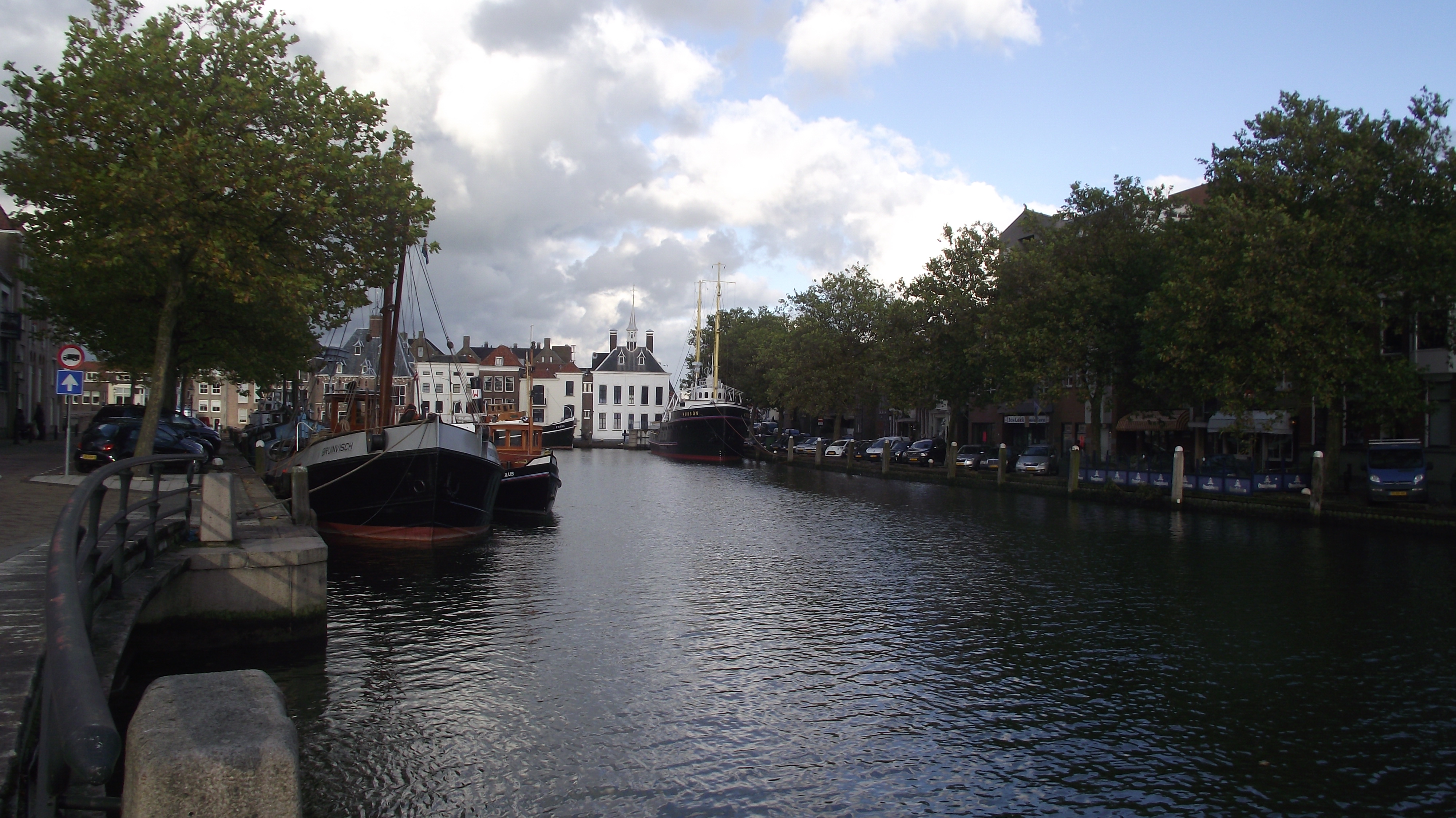 Zicht op de Hellinggat dok.